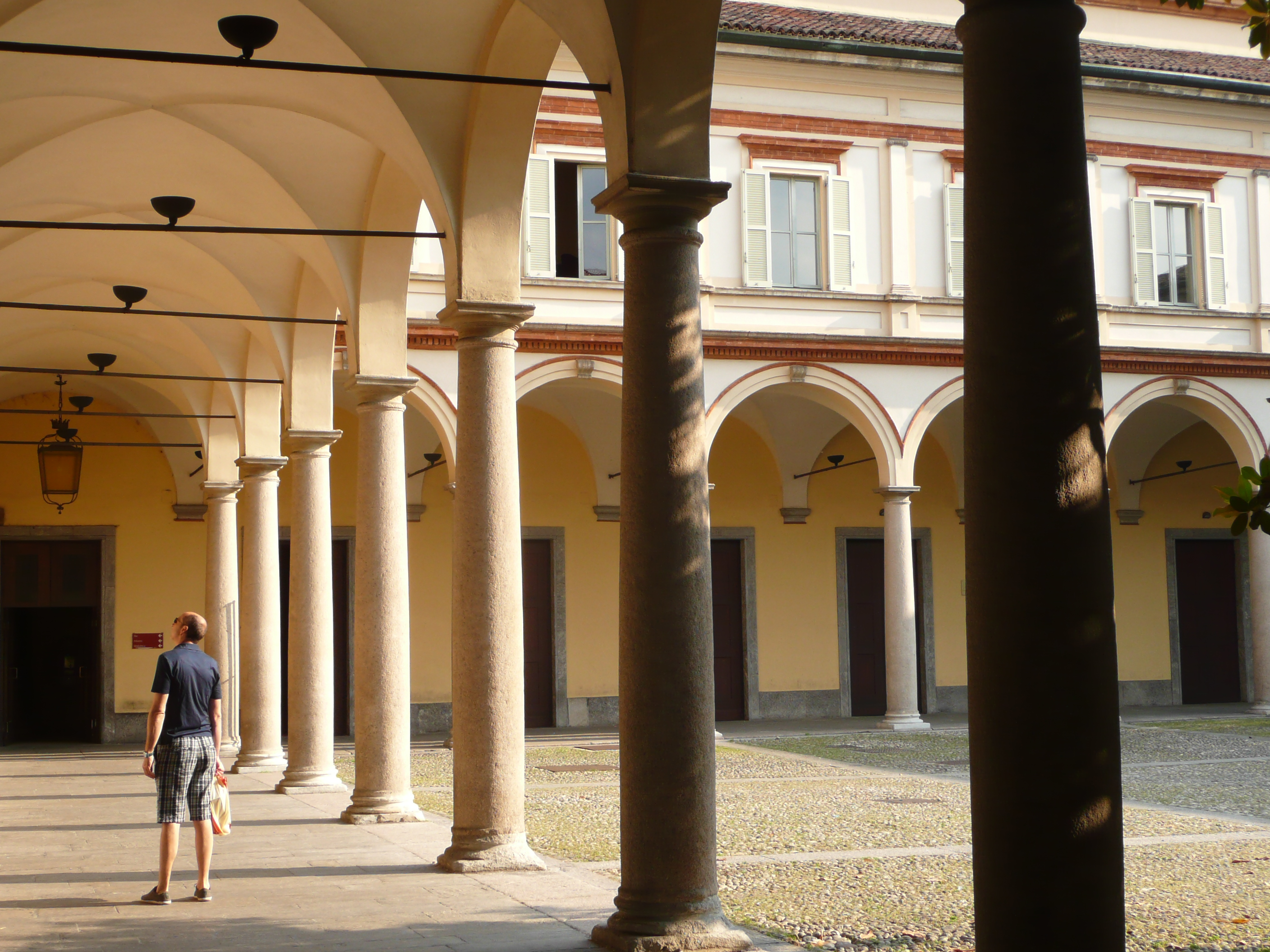 Conservatorio Giuseppe Verdi (Milan), cortile, ex chiostro di Santa Maria della Passione (XIV secolo)